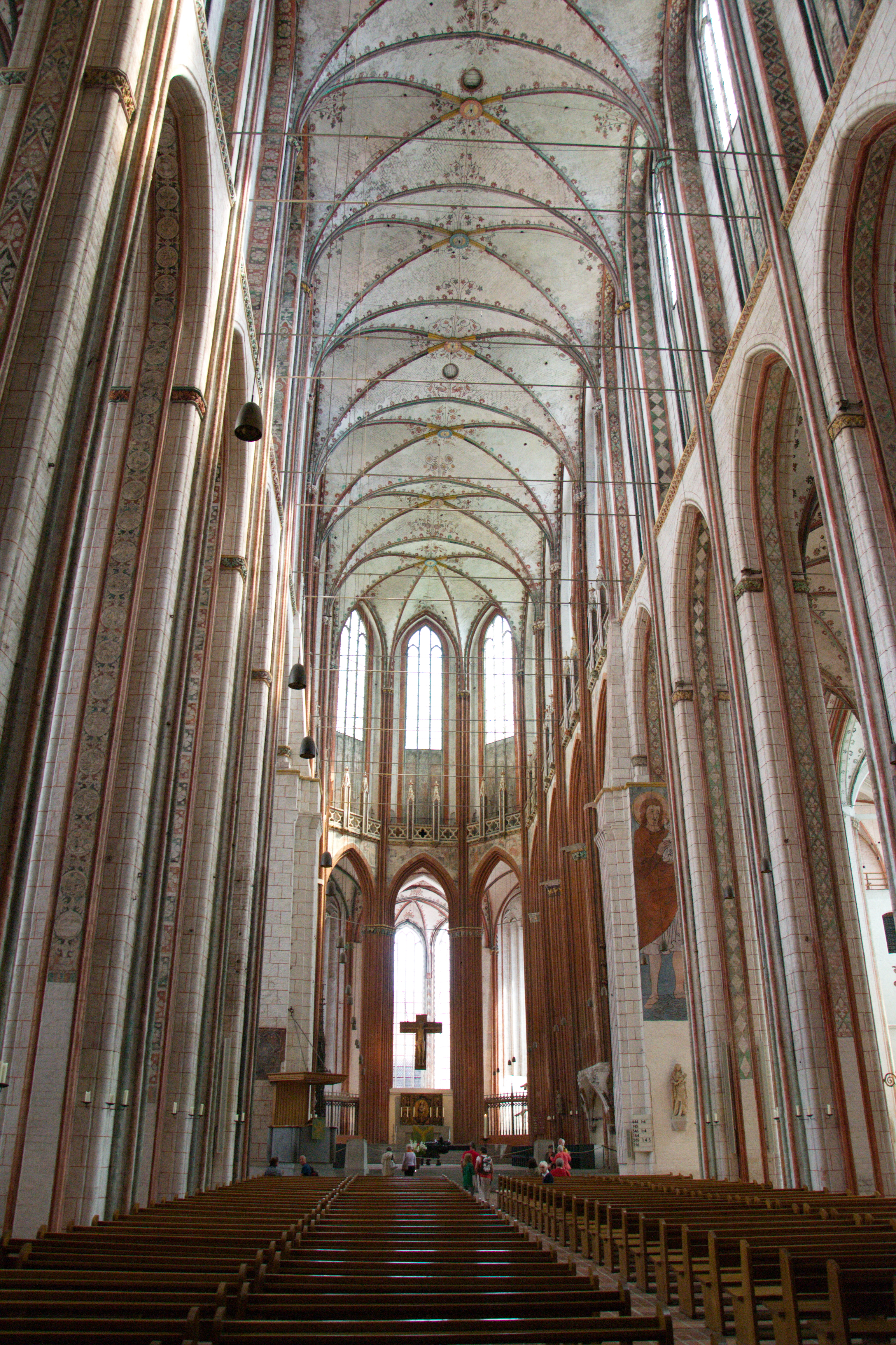 Lübeck Marienkirche